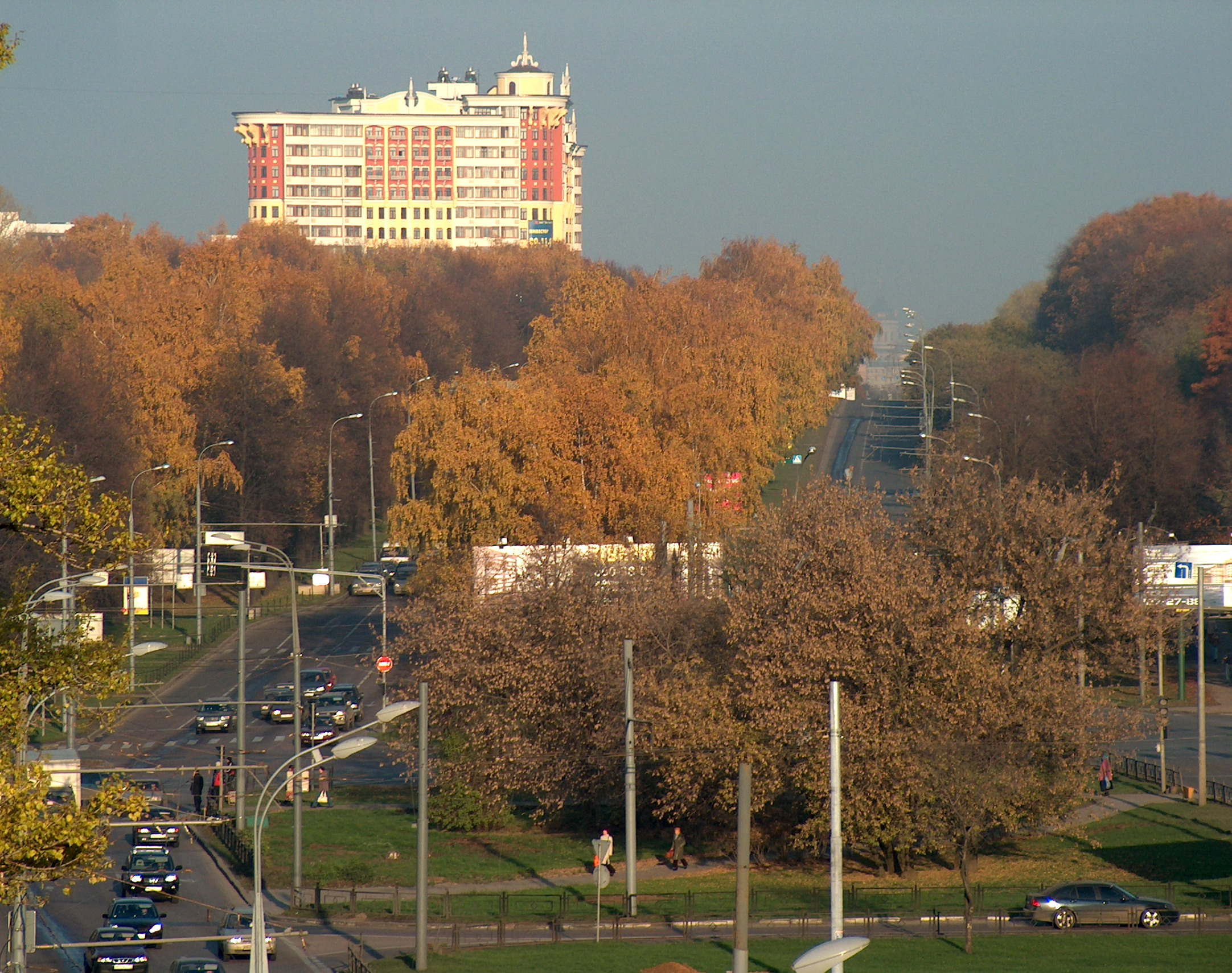 Michurinsky Prosprkt, Moscow